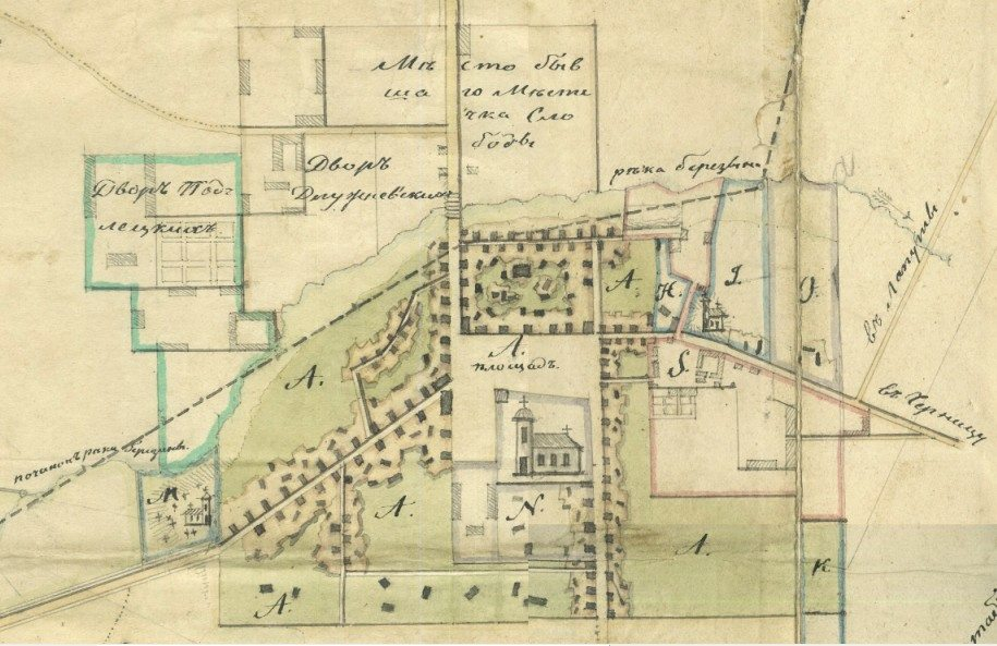 Беларуская (тарашкевіца): Докшыцы (Dokšycy). Плян места